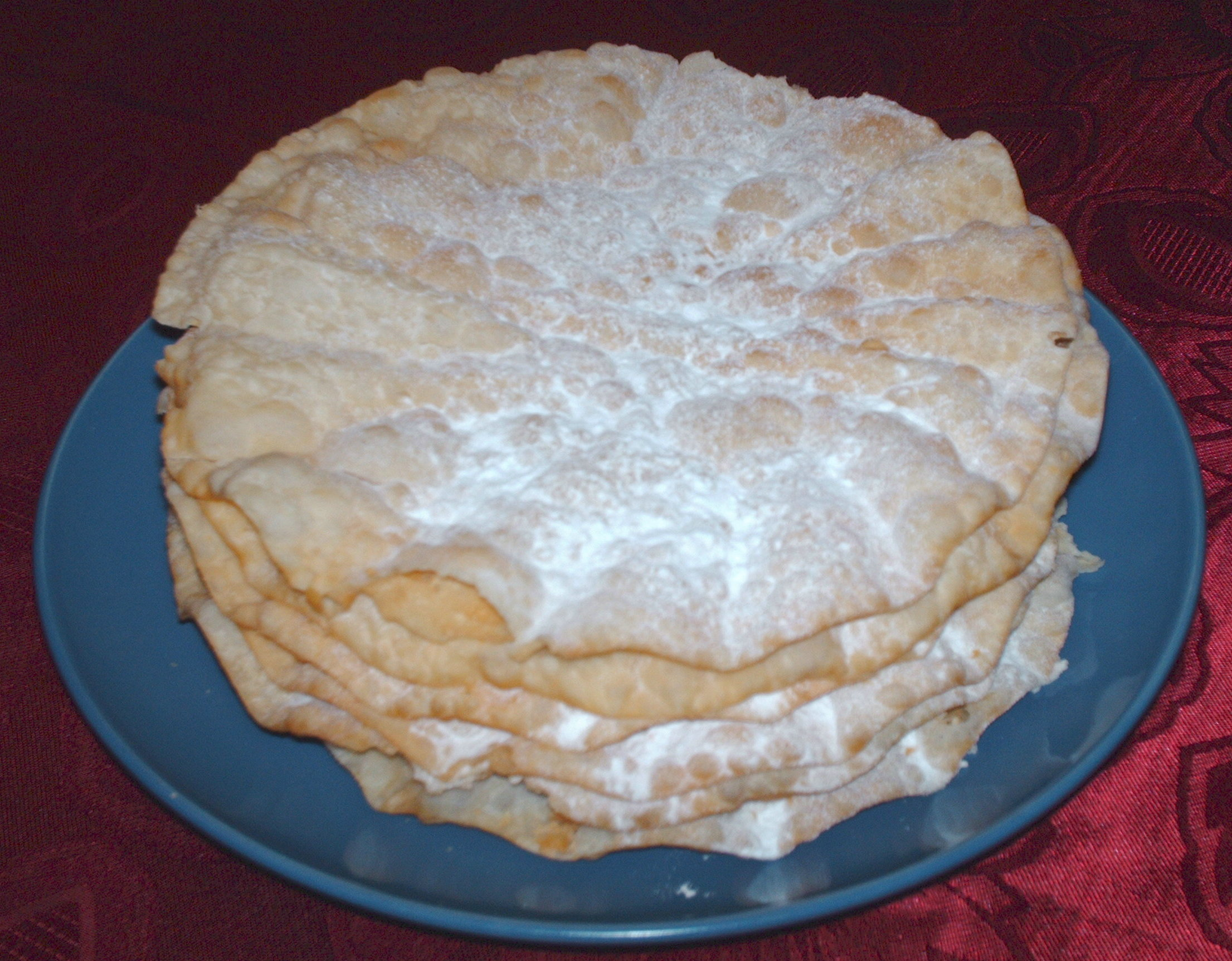 Fasnachtschuechli